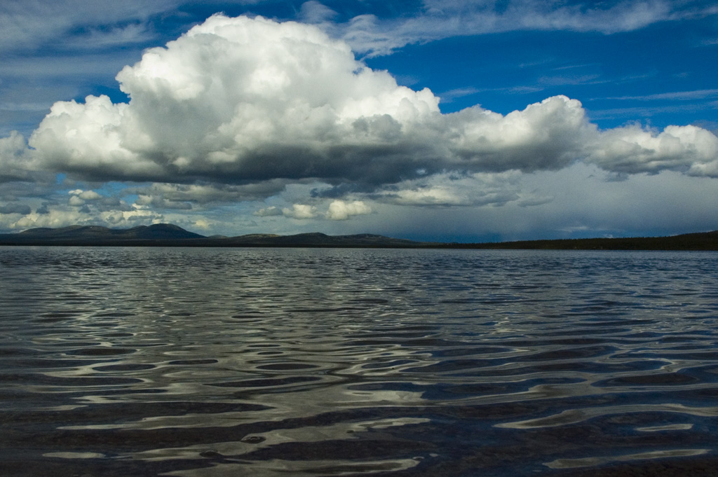 Sølensjøen